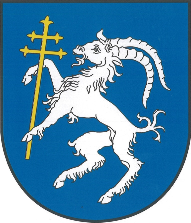 Wappen der Gemeinde Sankt Anna am Aigen